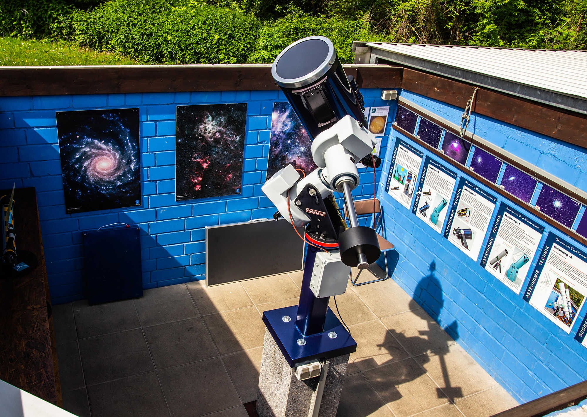 Teleskop in Sternwarte 1